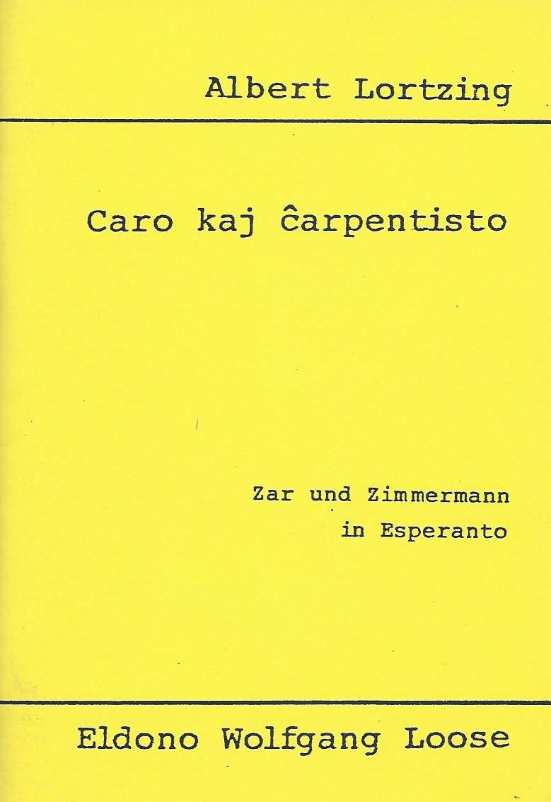 kovrilo de "Caro kaj Ĉarpentisto", 1994